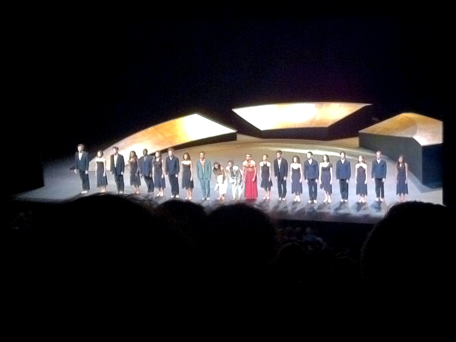 Roméo et Juliette de Joelle Bouvier par le Ballet du Grand Théâtre de Genève - Du 7 au 9 avril 2011 au théâtre national de Chaillot